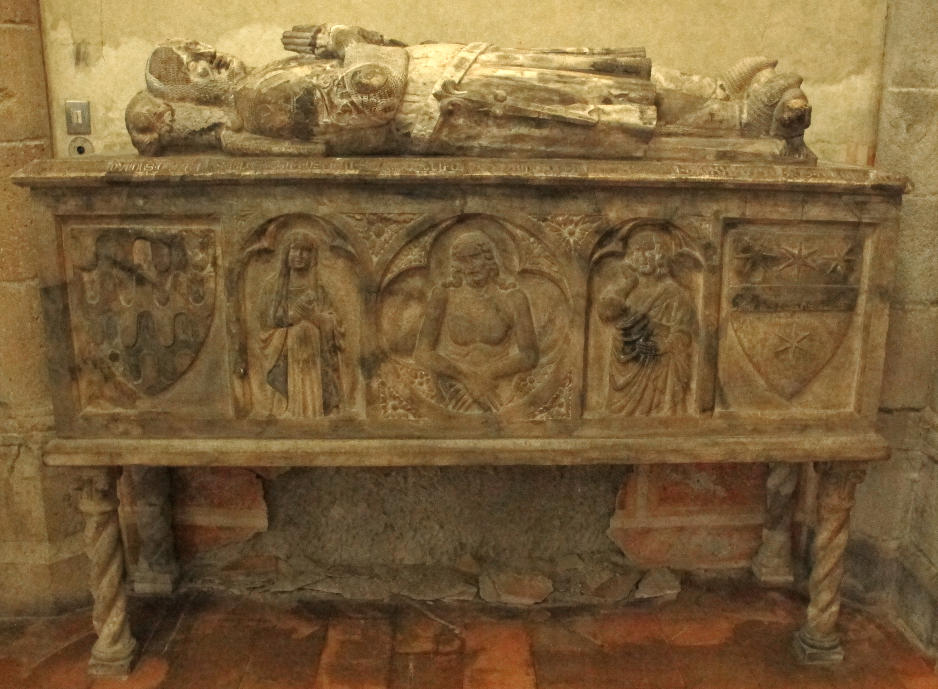 Santa Chiara (Napoli)